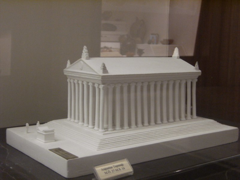 Augustus Tapınağı'nın Anadolu medeniyetleri müzesindeki minyatürü